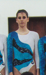 Isabel Gómez en el Gimnasio Moscardó (Madrid) en 1991.